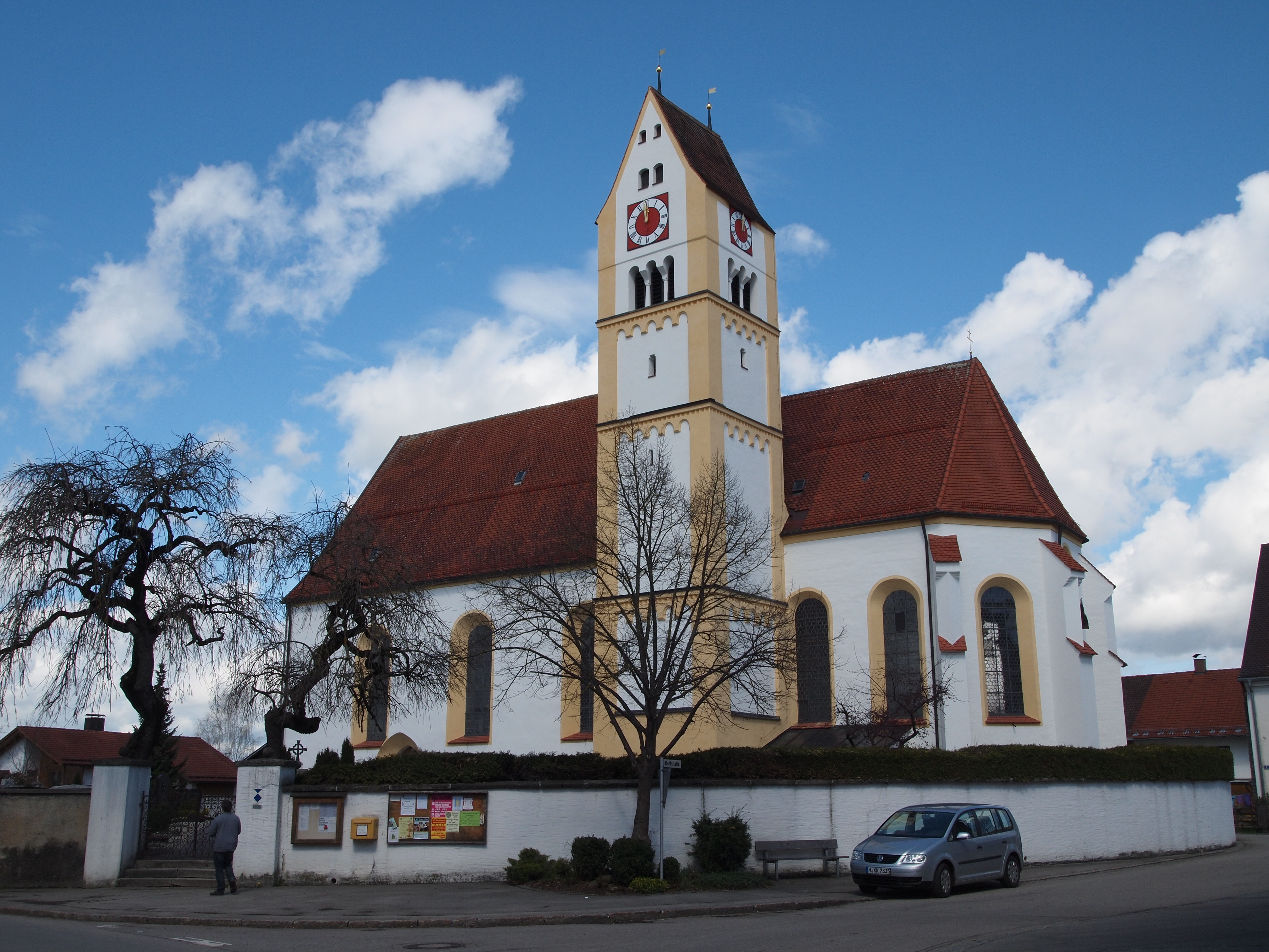 Katholische Pfarrkirche Mariae Himmelfahrt im OT Altdorf ( Biessenhofen)